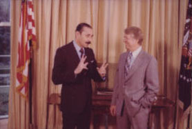 El presidente de facto de Argentina, Jorge Rafael Videla, junto al presidente de los Estados Unidos, Jimmy Carter, en la Casa Blanca.